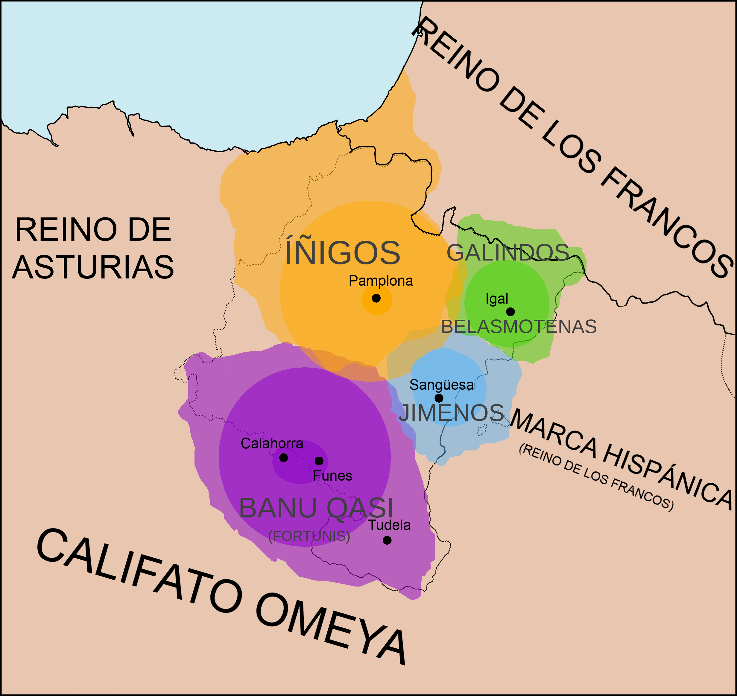 Mapa que muestra los grandes clanes vascones